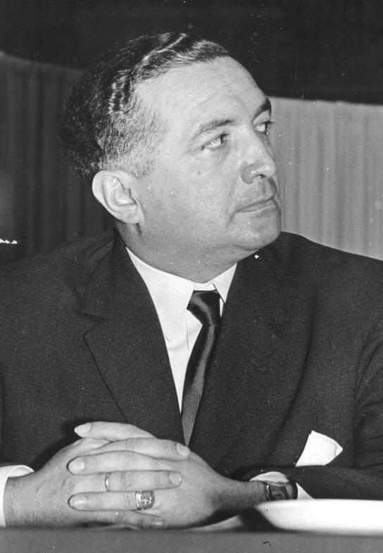 Zentralbild/Berg 10.2.58 [Herausgabedatum] FDP-Politiker befürworten Rapacki-Plan Ein Bekenntnis zum Rapacki-Plan für die Schaffung einer atomwaffenfreien Zone in Mitteleuropa legte der nordrhein-westfälische Finanzminister Weyer am 7.2.58 vor 199 Delegierten des Landesparteitages Nordrhein-Westfalen der FDP in Düsseldorf ab. Er versicherte, die FDP werde mit allen Mitteln gegen die Errichtung von Raketenabschußbasen in der Bundesrepublik kämpfen. UBz: Auch der Fraktionsvorsitzende der FDP im Bundestag, Dr. Mende, setzte sich auf dem Landesparteitag für internationale Übereinkommen zur Entspannung der Lage in Europa ein. Er befürwortete ebenfalls die Schaffung einer atomwaffenfreien Zone in Mitteleuropa. 52920/ 2 N